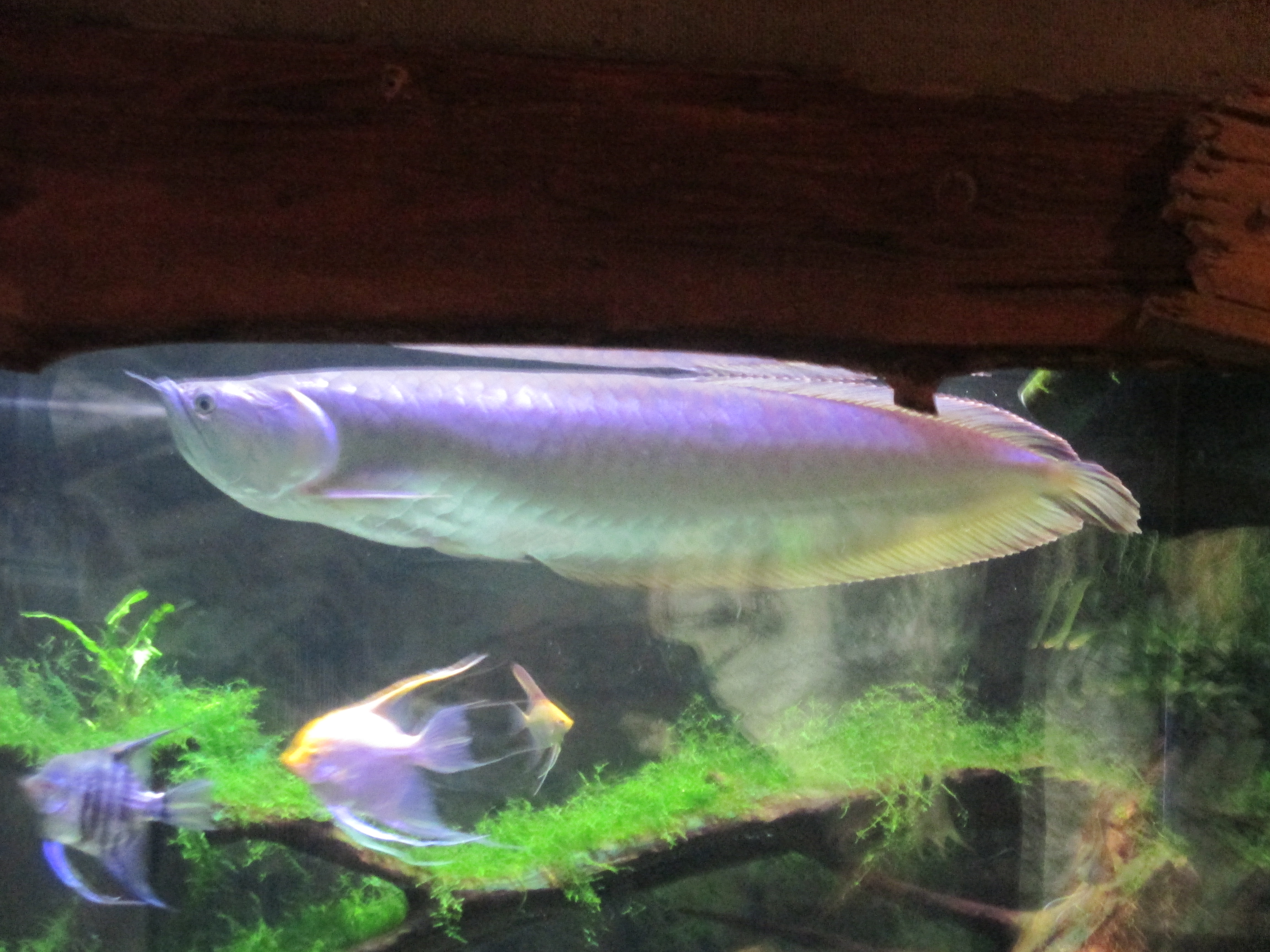 דג ארואניה בפארק המצפה התת-ימי באילת